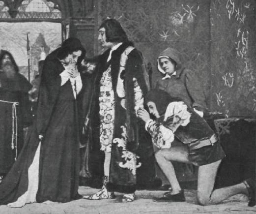 Representación de la obra de teatro Doña María la Brava, de Eduardo Marquina, con María Guerrero, Fernando Díaz de Mendoza y María Cancio